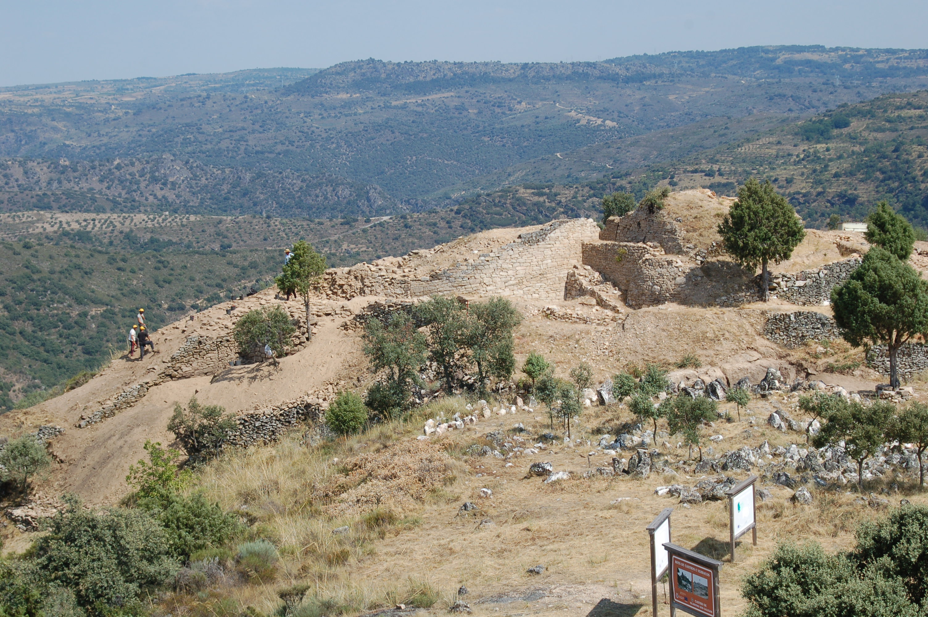 Castelo dos Mouros, vista geral 1